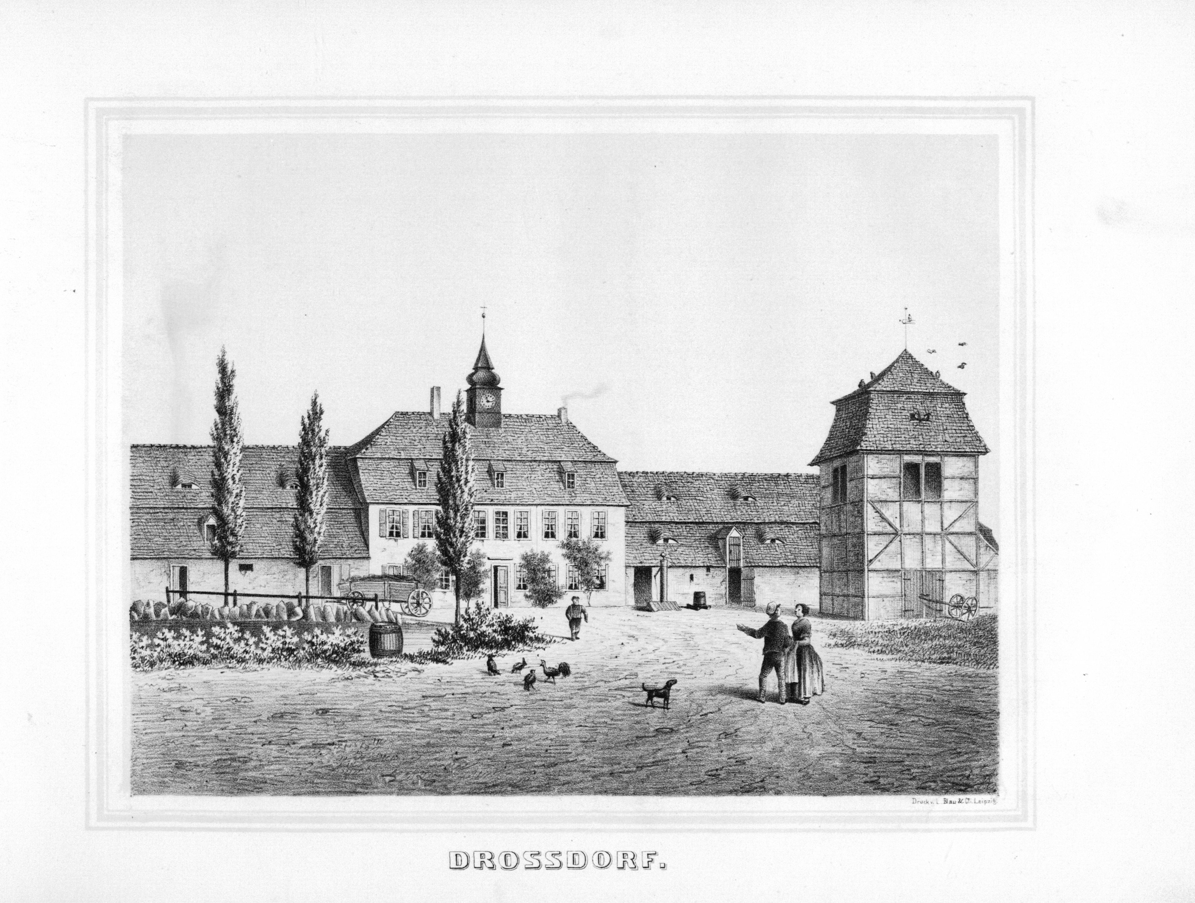 Droßdorf aus: Album der Rittergüter und Schlösser im Königreiche Sachsen Leipziger Kreis Section: I